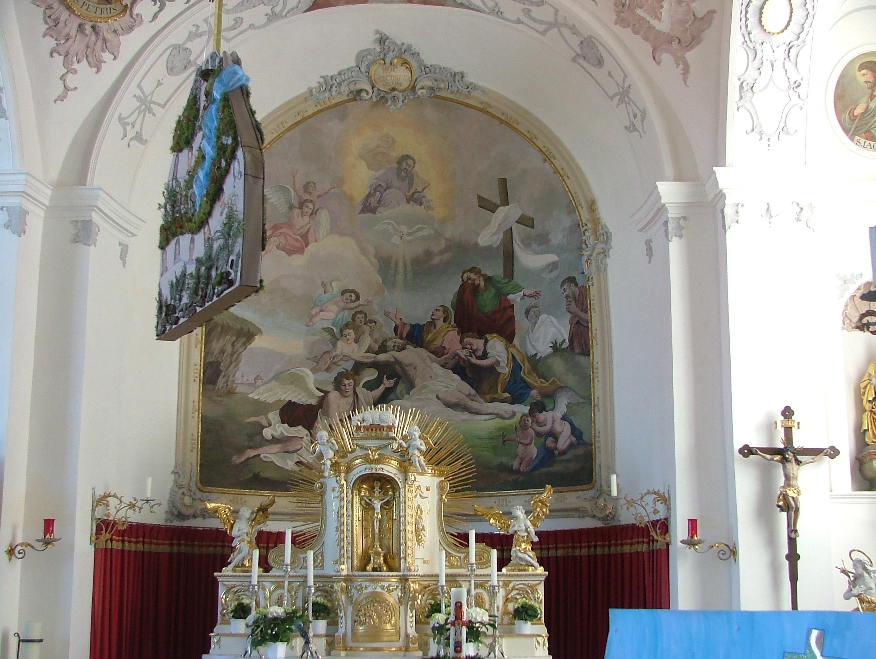 Heimertingen